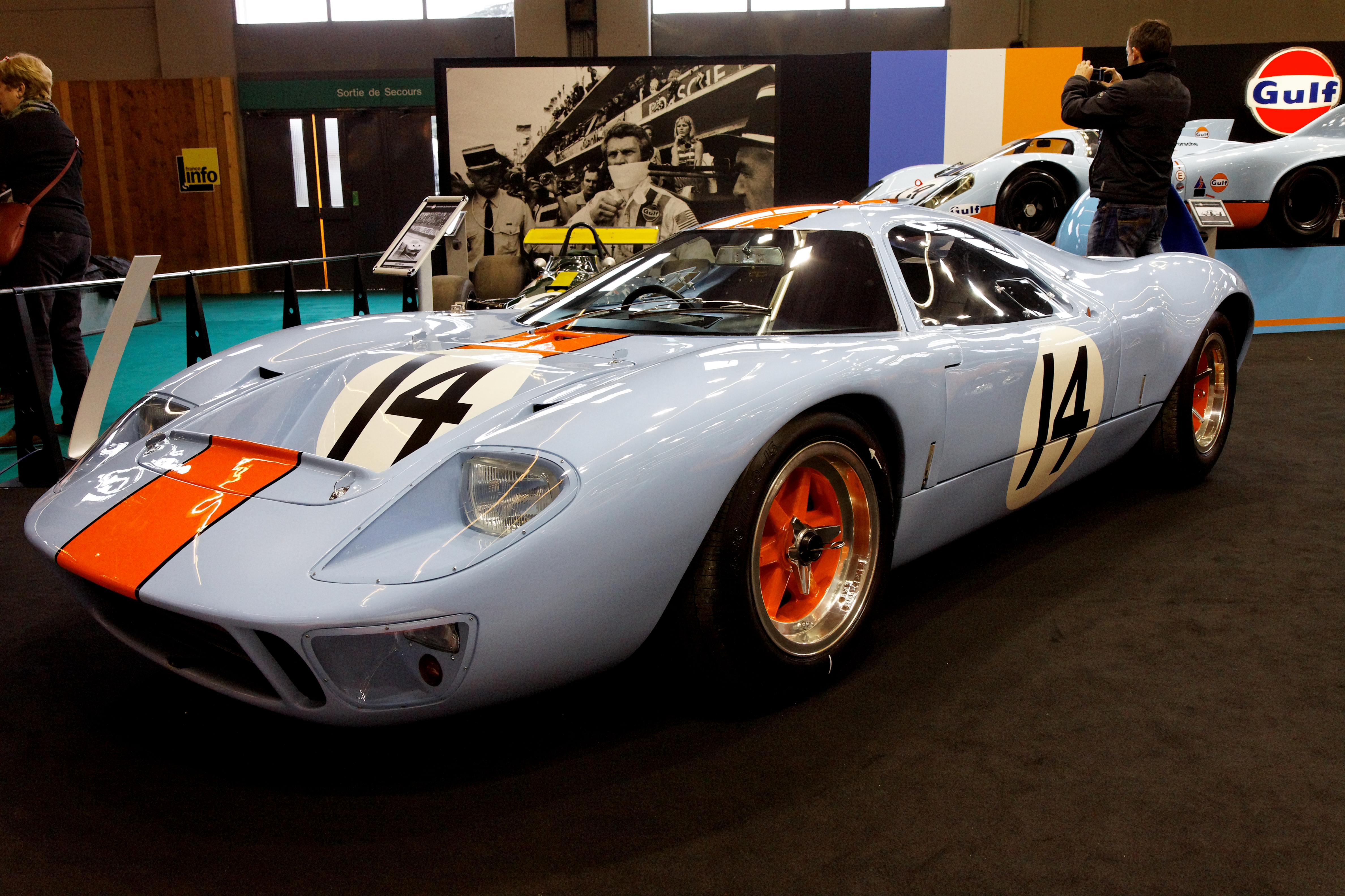 Photographie prise lors du salon rétromobile 2011 à Paris, porte de Versailles.